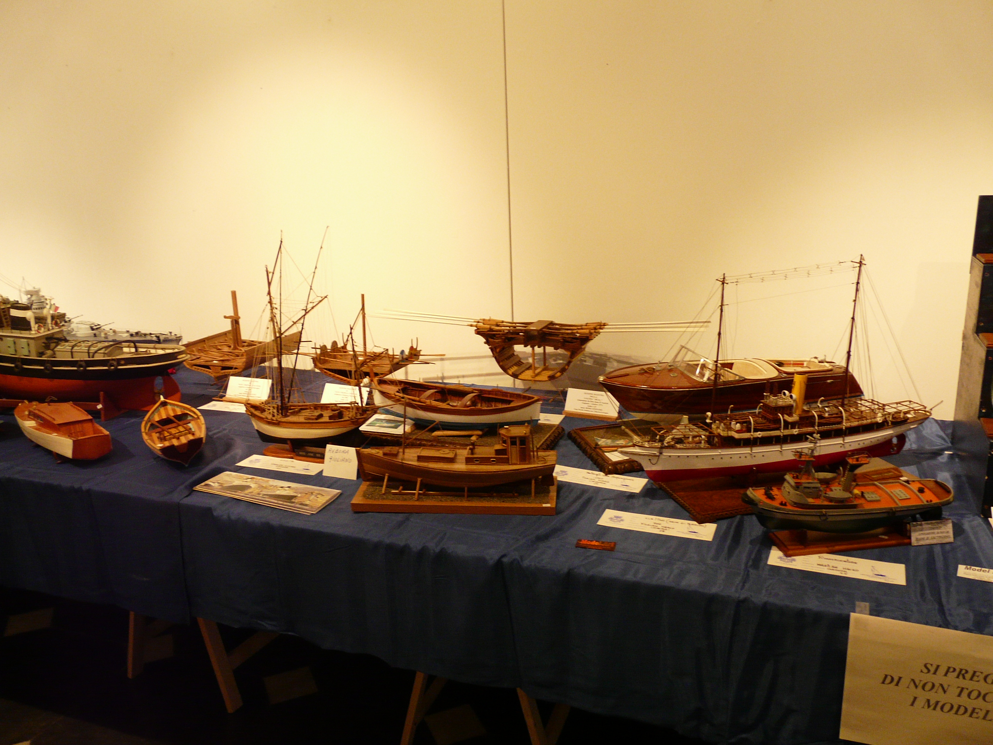 Modellini navali in mostra alla manifestazione Mare Nostrum di Rapallo, Liguria, Italia